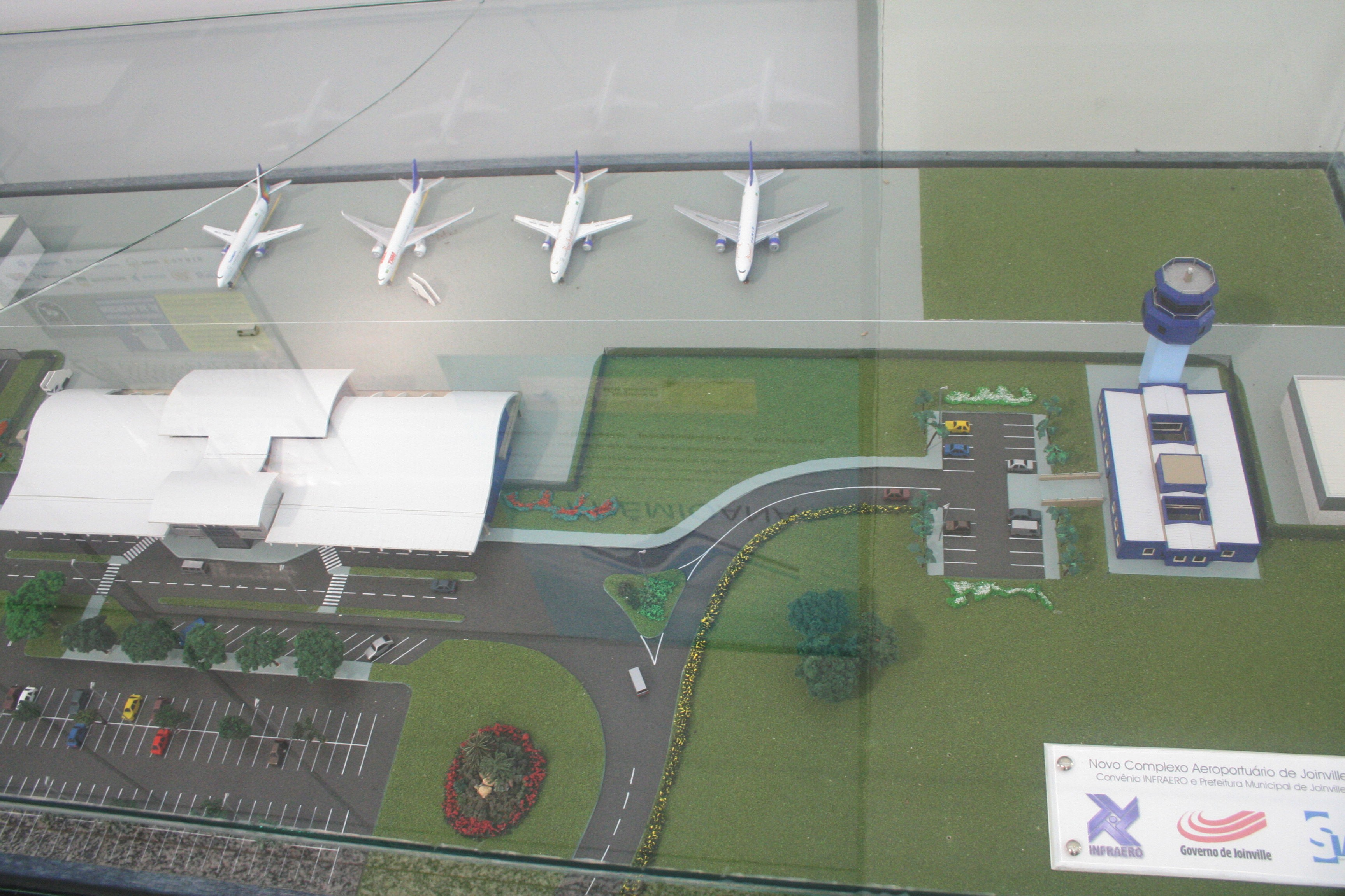 Joinville Airport.